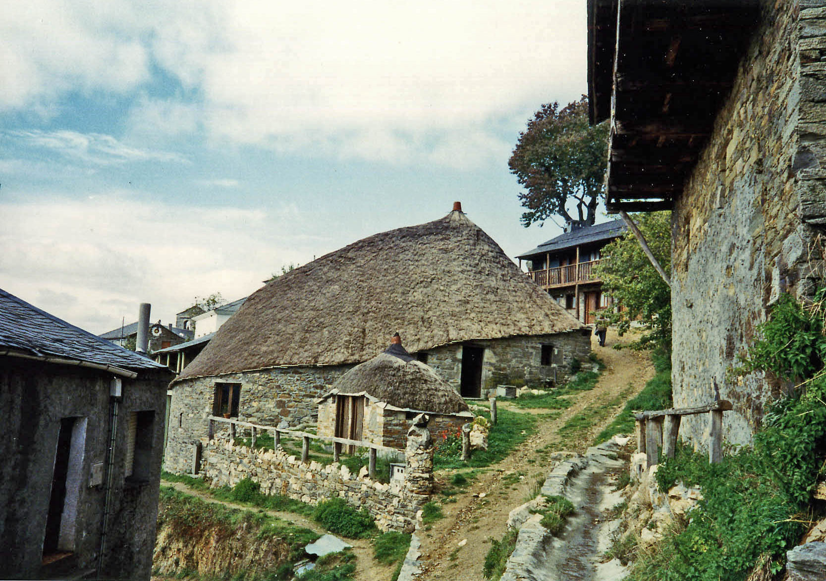 Palloza y pajar en la localidad de Cantejeira, municipio de Balboa en León, España. (Fotografía en papel).